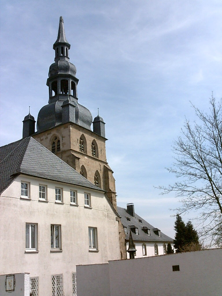 Kirche und Benediktinerabtei von Tholey, selbst fotografiert, 21.04.2006, --Xocolatl 23:05, 21 April 2006 (UTC)